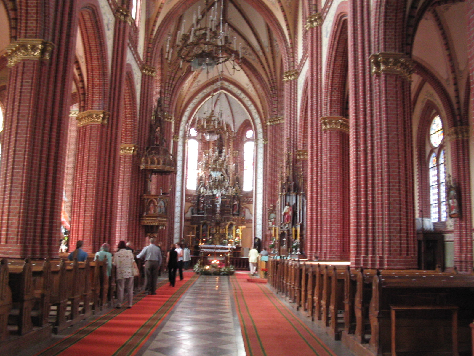 Švėkšnos bažnyčios vidus